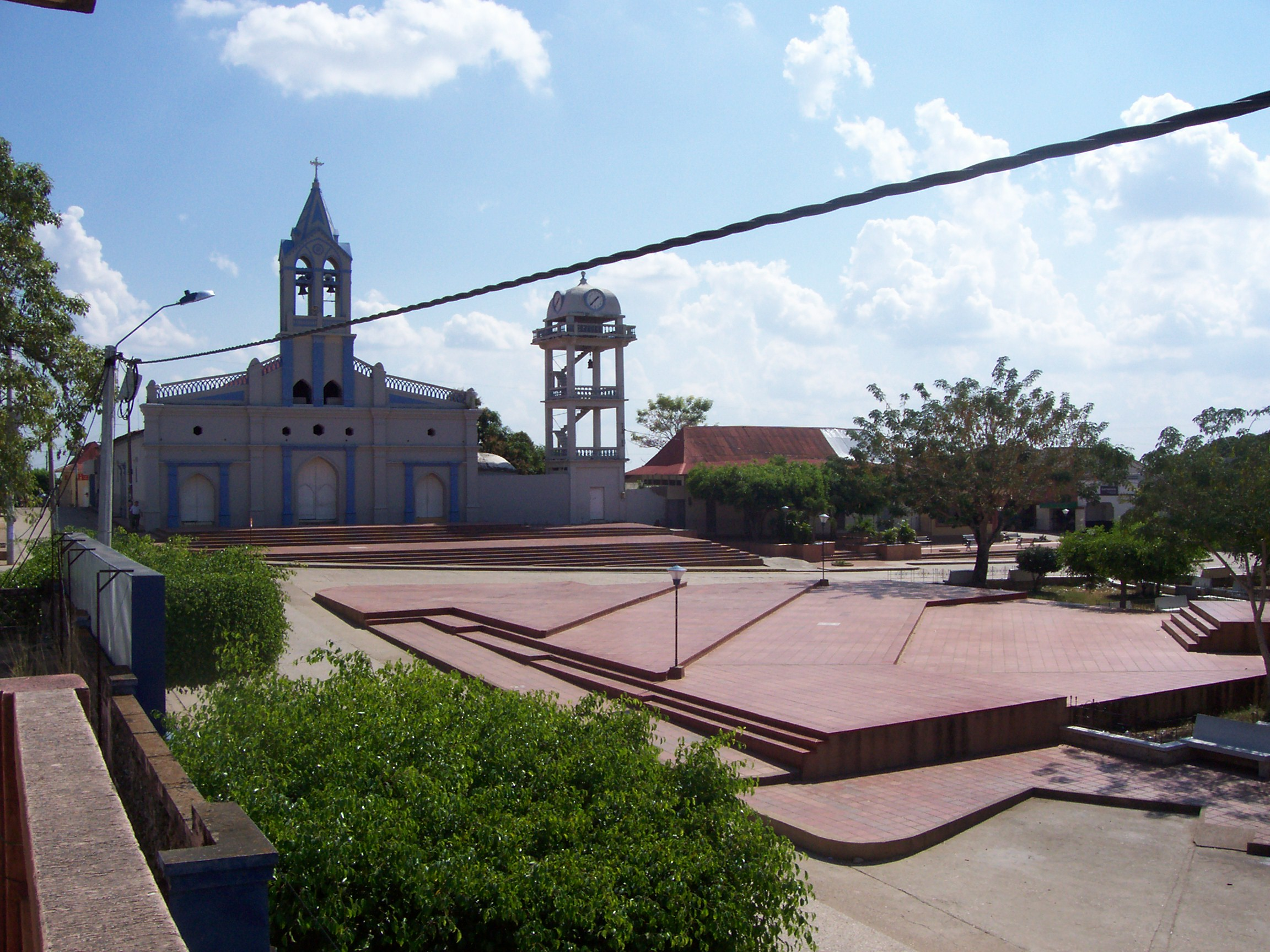 Plaza Principal e Iglesia Principal de Sincé